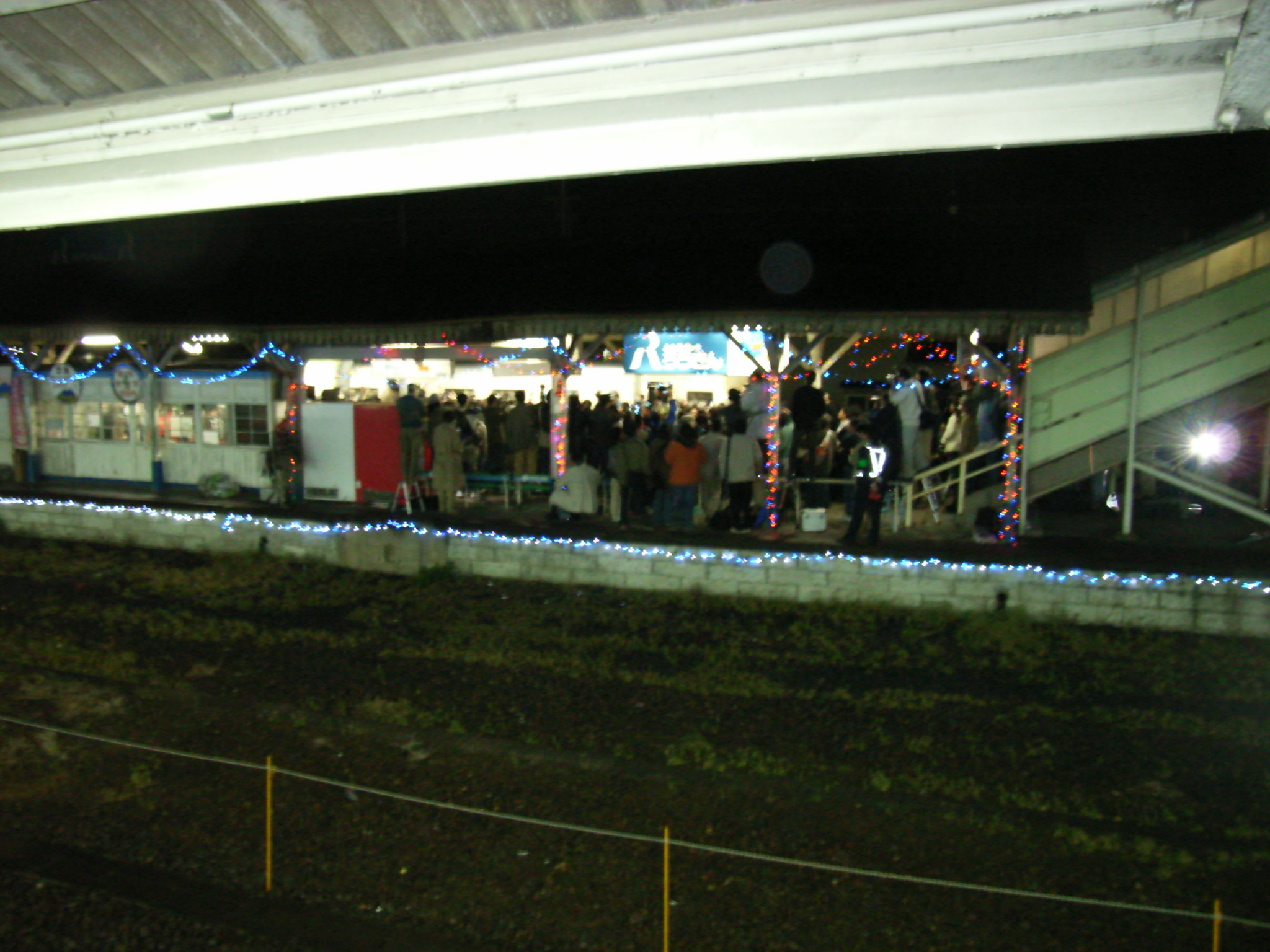 鹿島鉄道廃止日(2007年3月31日）下り鉾田行き最終列車の出発（石岡にて）